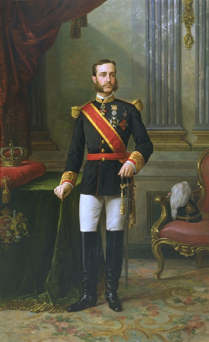 Retrato del rey Alfonso XII de España (1857-1885), vestido con uniforme de gala de capitán general.